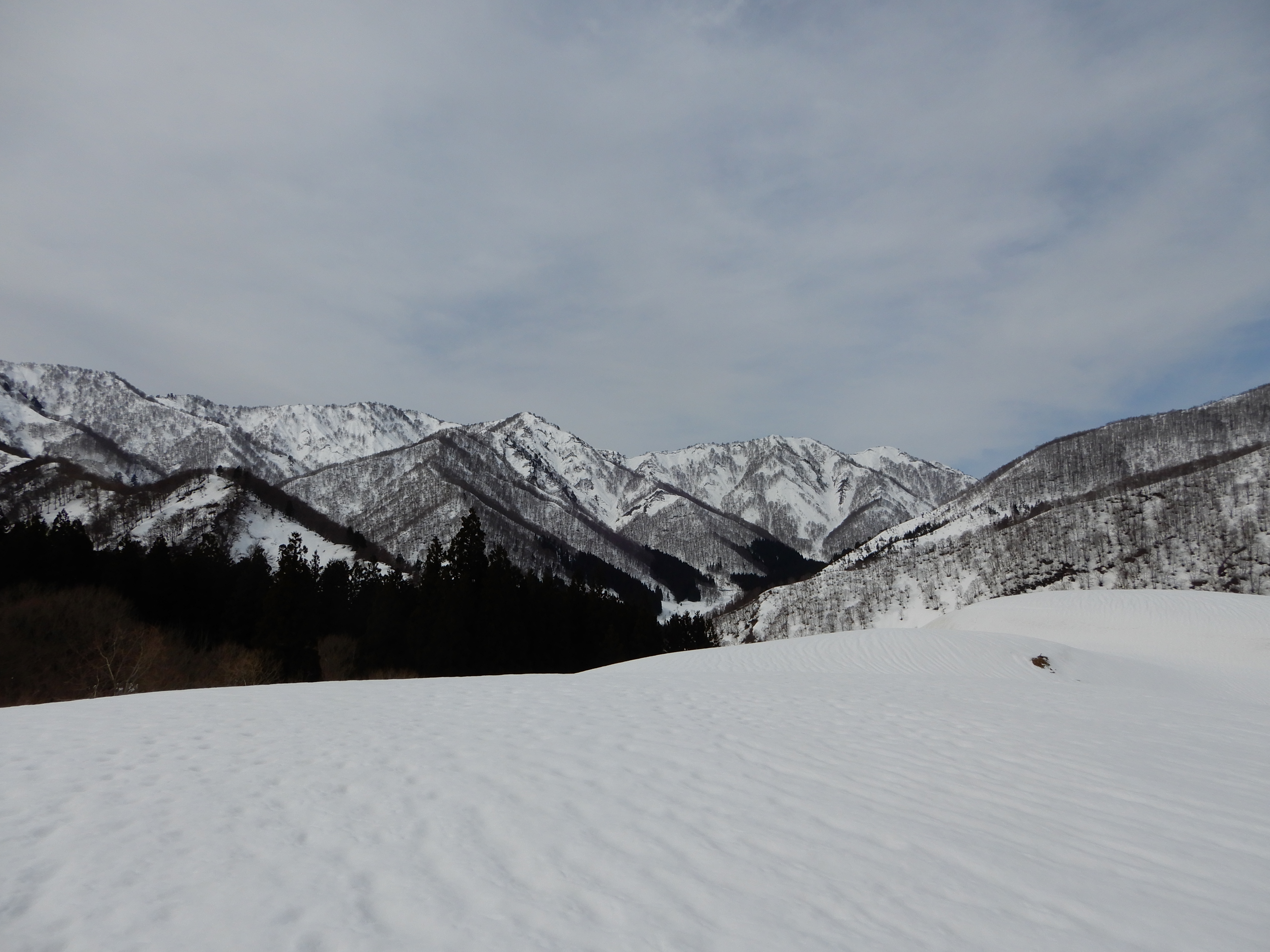 ロクロノ頭 2019-03-26